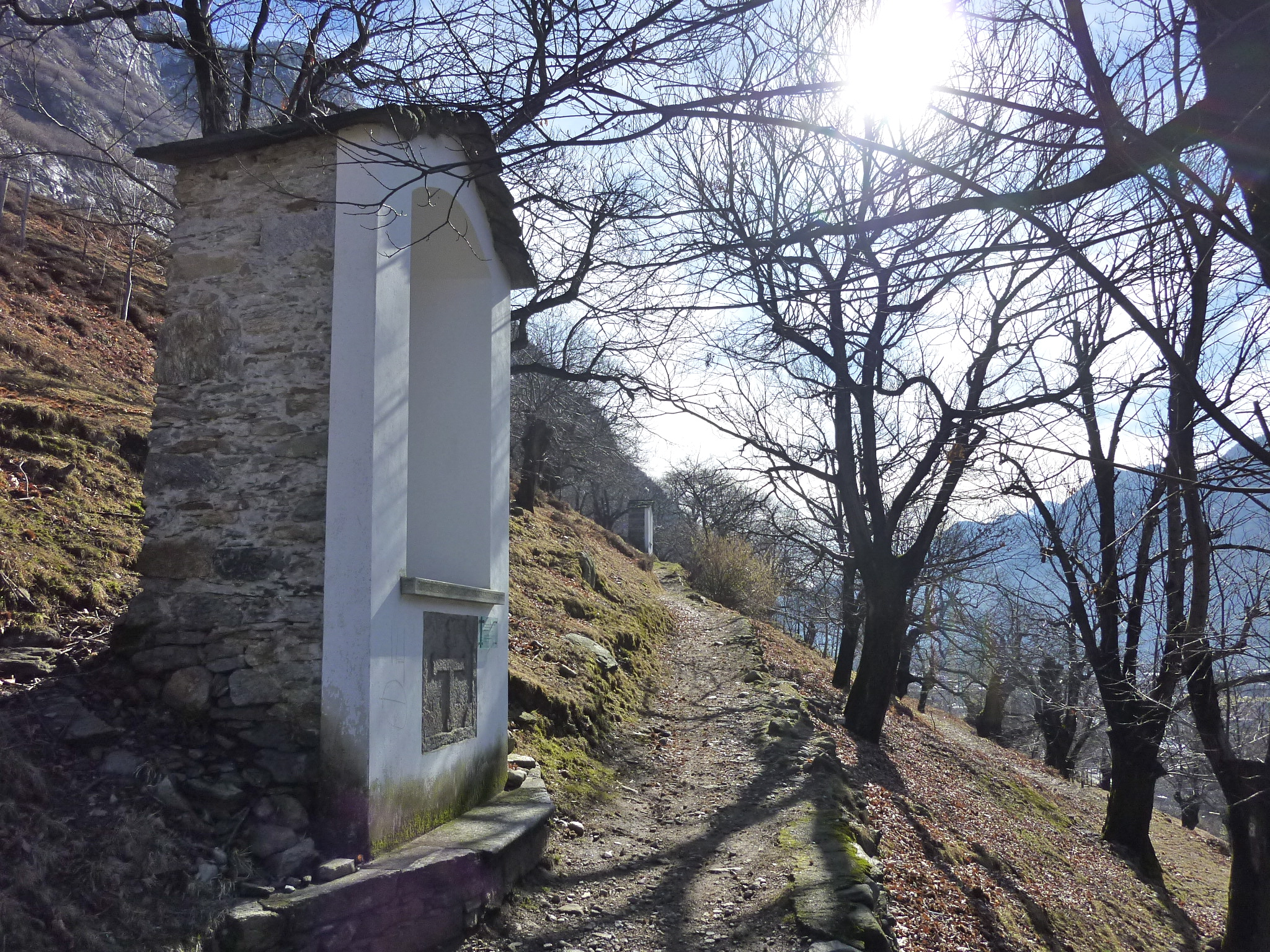 Kirche San Pietro e Paolo (Biasca) Kreuzweg Richtung Süden